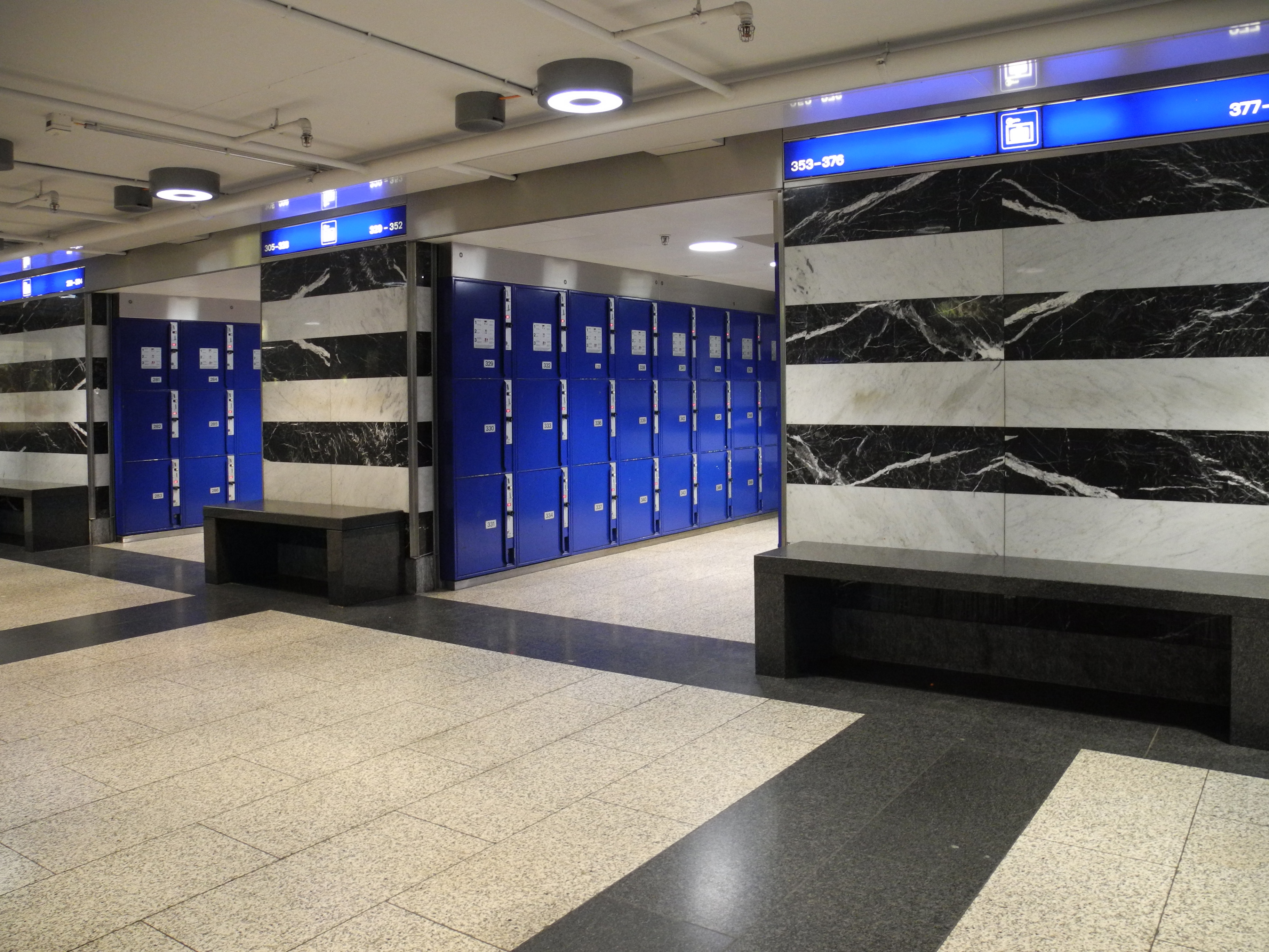 Schliessfächer, Wandgestaltung mit schwarz-weissem Marmor